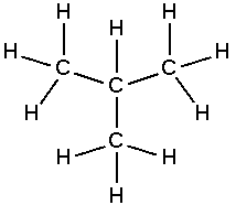 Isobutane